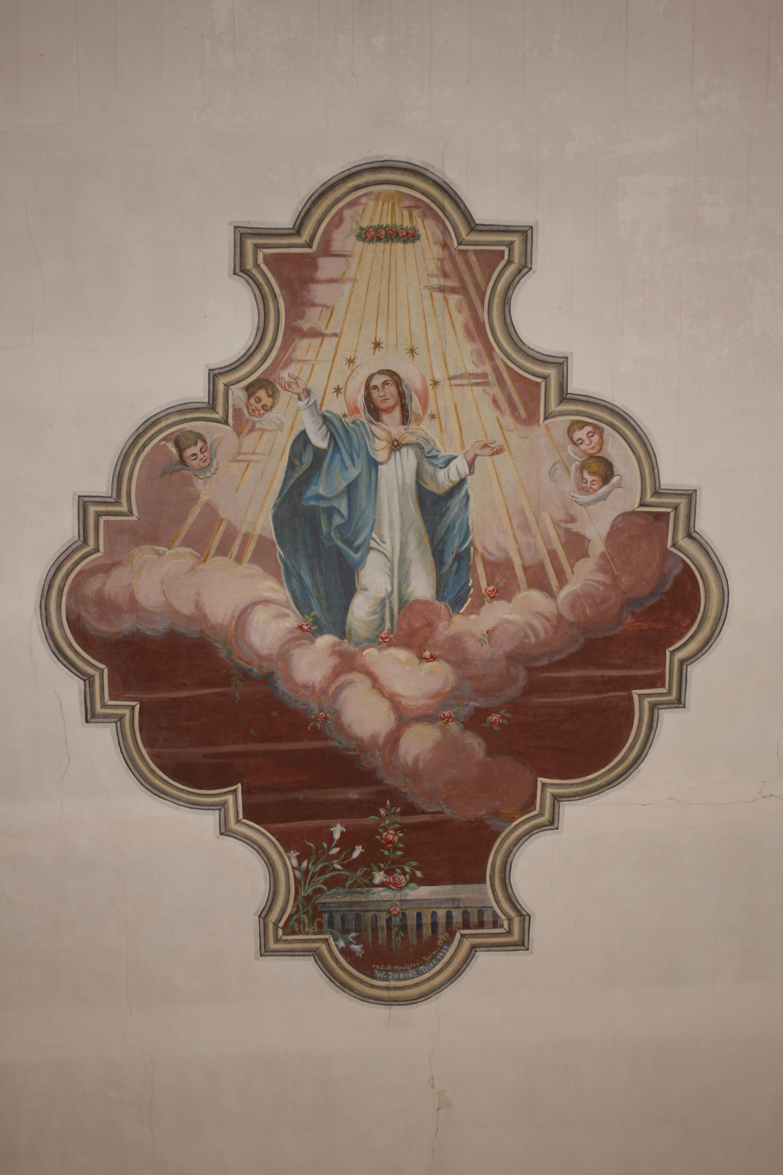 Deckenmalerei